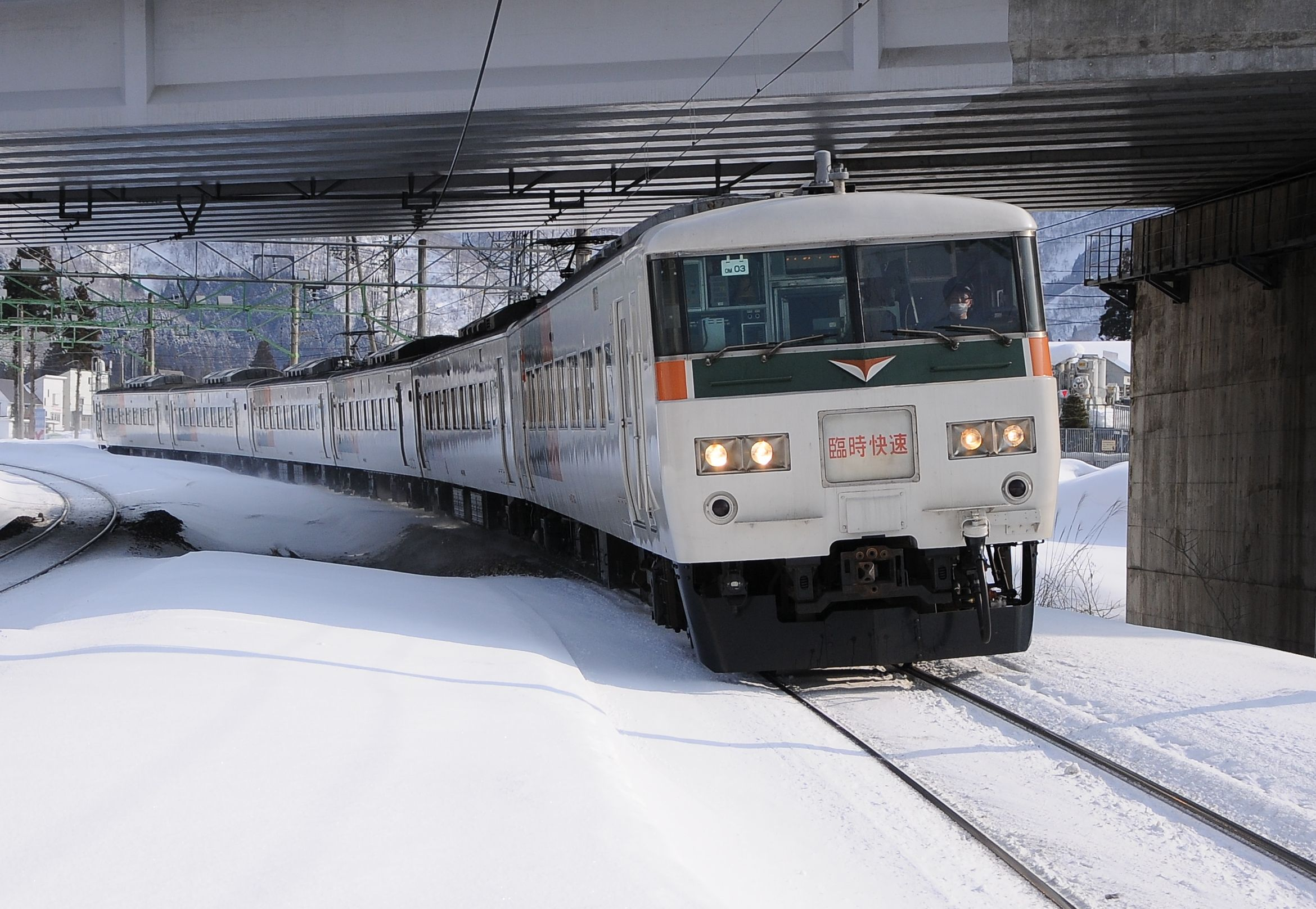 シーハイル上越号石打行。岩原スキー場前駅にて撮影。2014年より185系6両編成にて運転。